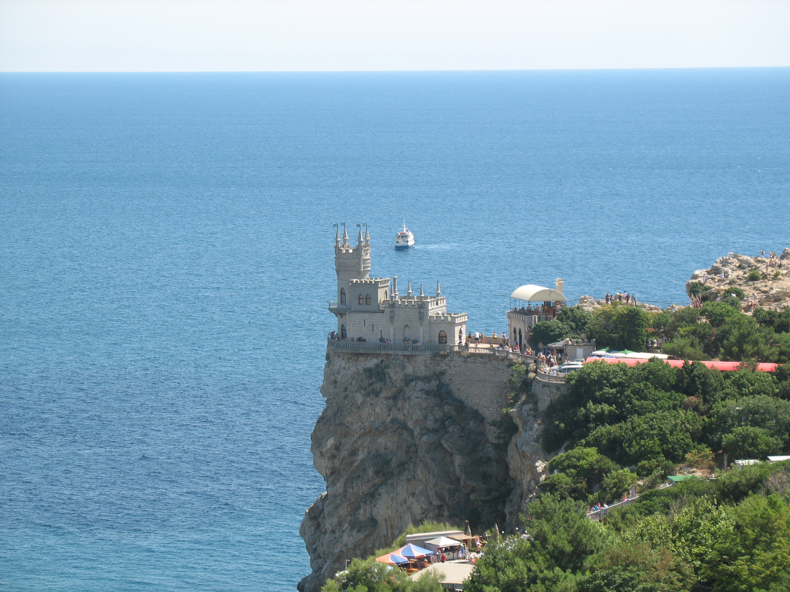 Ласточкино гнездо